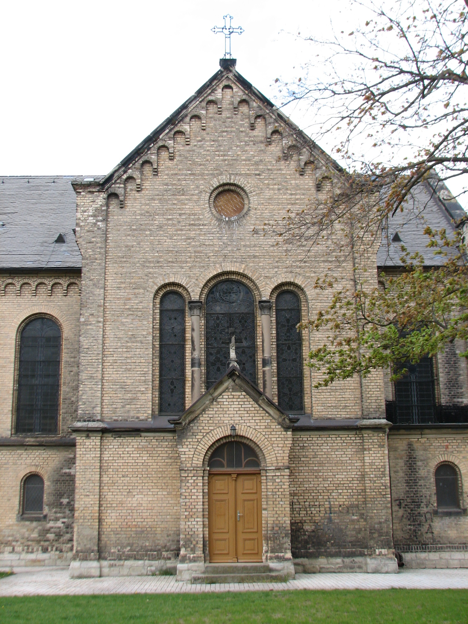 Kirche zu Leopoldshall, Foto vom April 2019